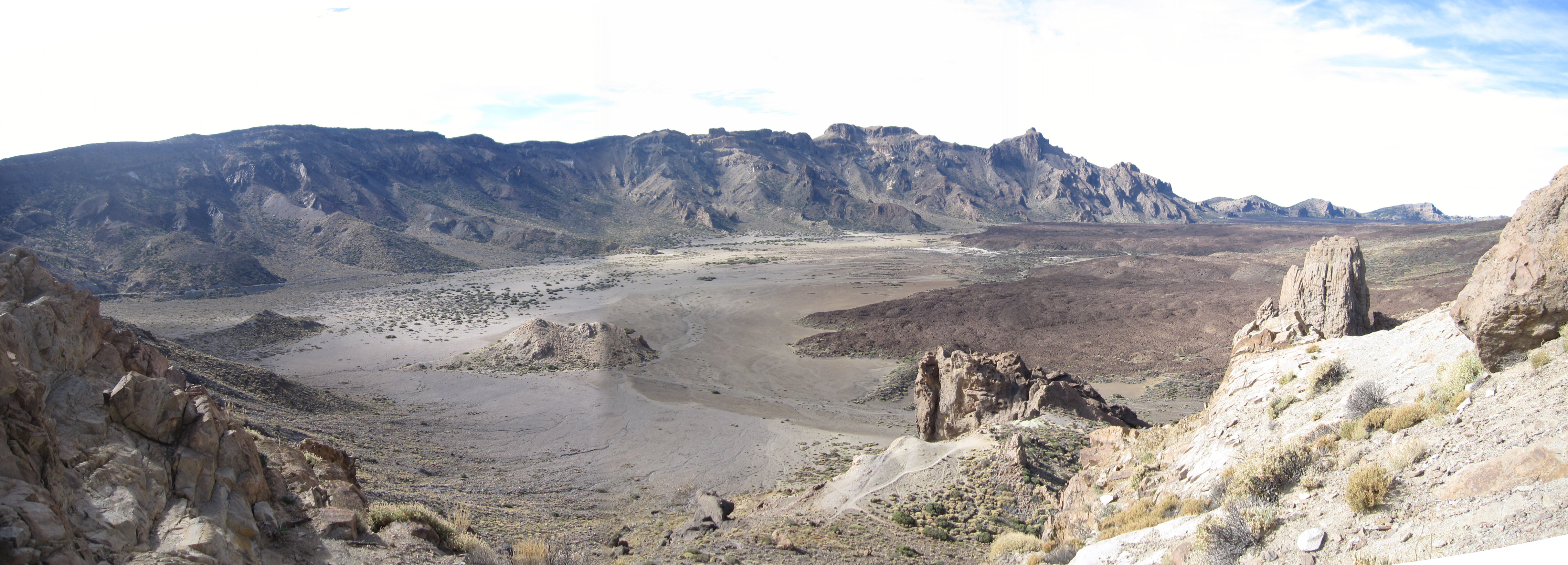 Kaldera Las Cañadas ob vznožju vulkana El Teide v osrčju otoka Tenerife. Kaldera je ostanek še večjega/višjega ognjenika, ki ga je v preteklosti razneslo. Ognjenik El Teide raste na severnem robu tega kraterja.